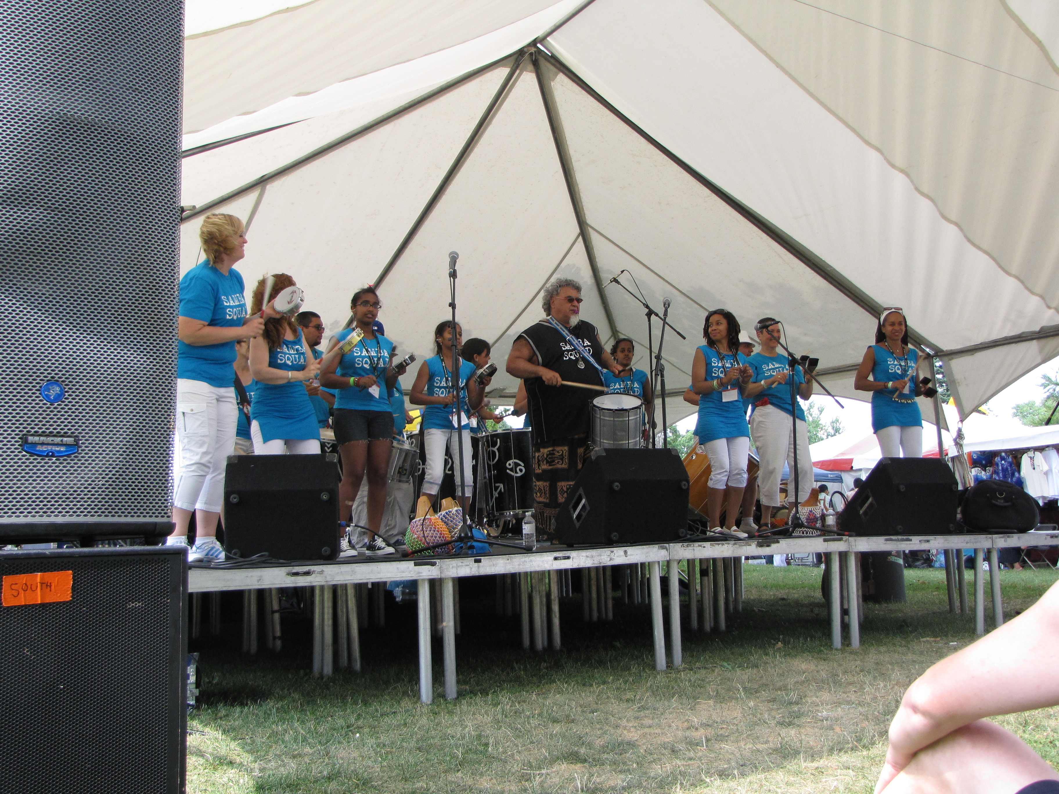 Samba Squad performing at Sunfest 2010